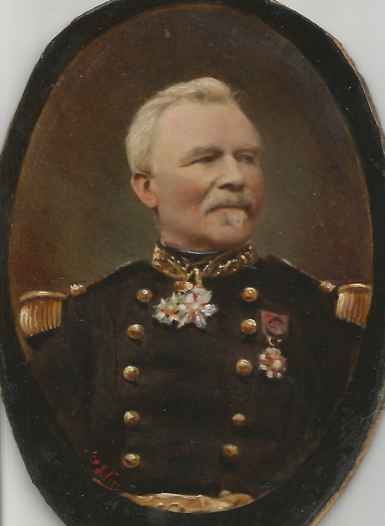 image transmise dans les archives familiales